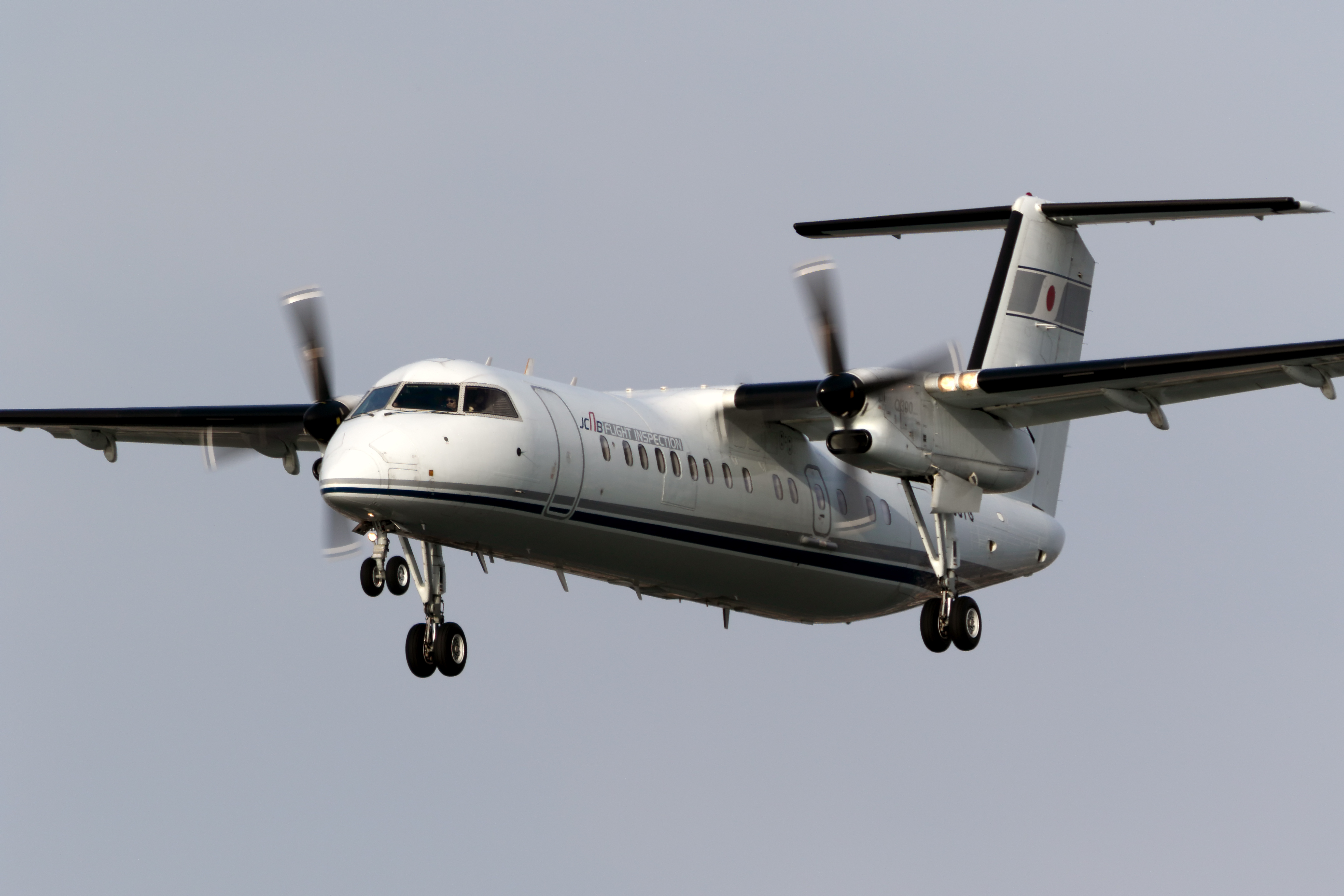 新潟空港で撮影された、国土交通省航空局JA007G